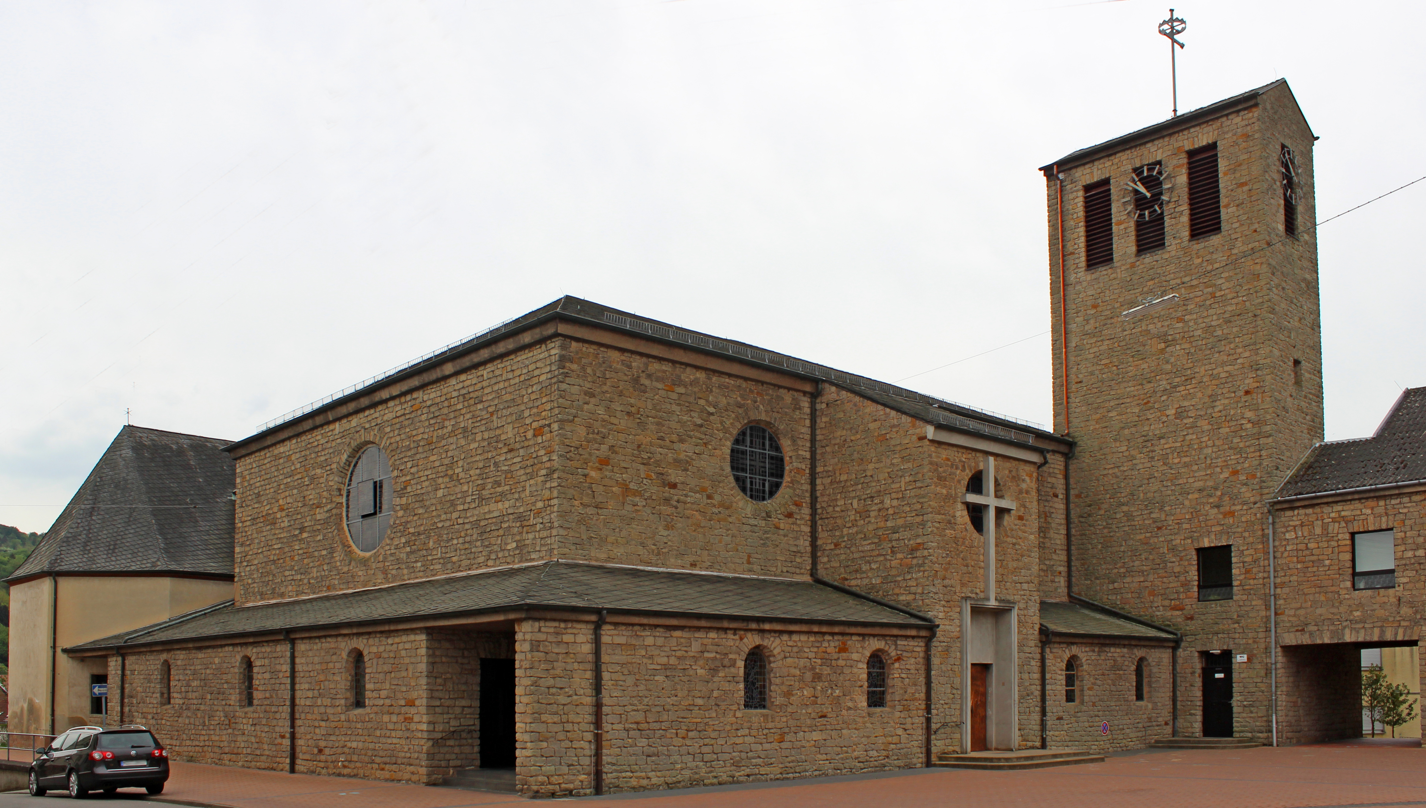 Die katholische Pfarrkirche St. Maria Magdalena in Brotdorf, einem Stadtteil von Merzig, Landkreis Merzig-Wadern, Saarland.